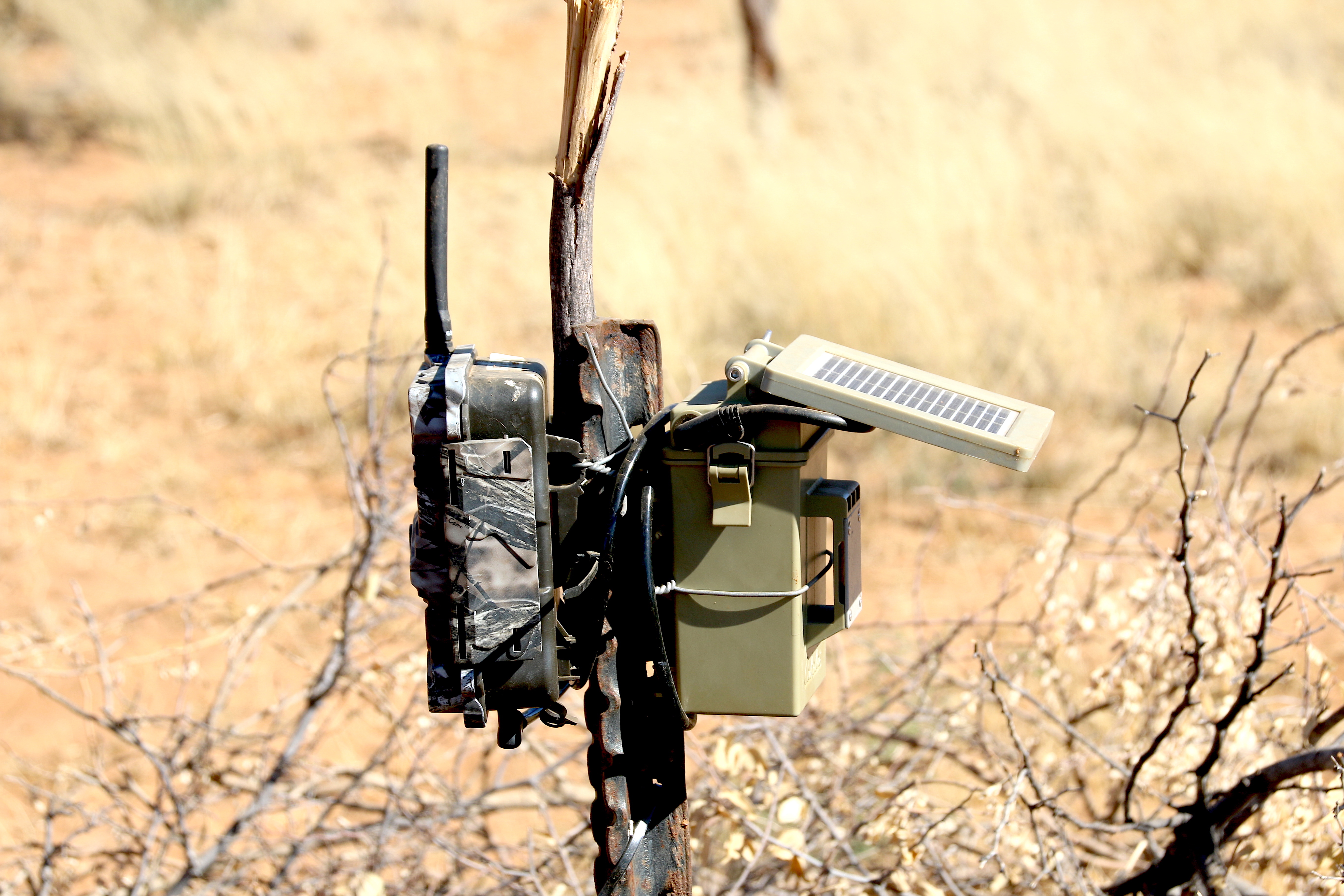 Fotoapparat Farm Masindi Namibia (2019)